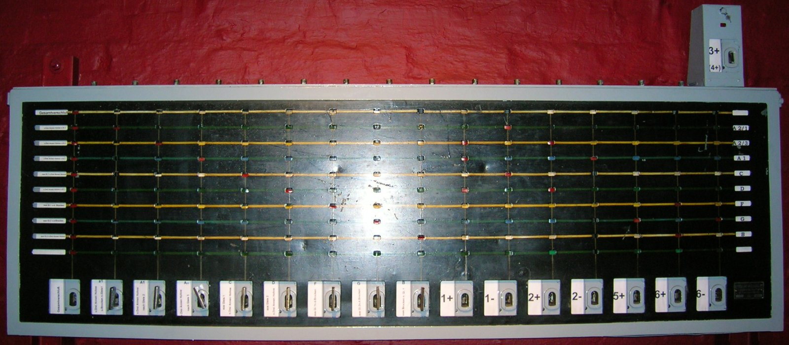 Schlüsselwerk in Wernigerode